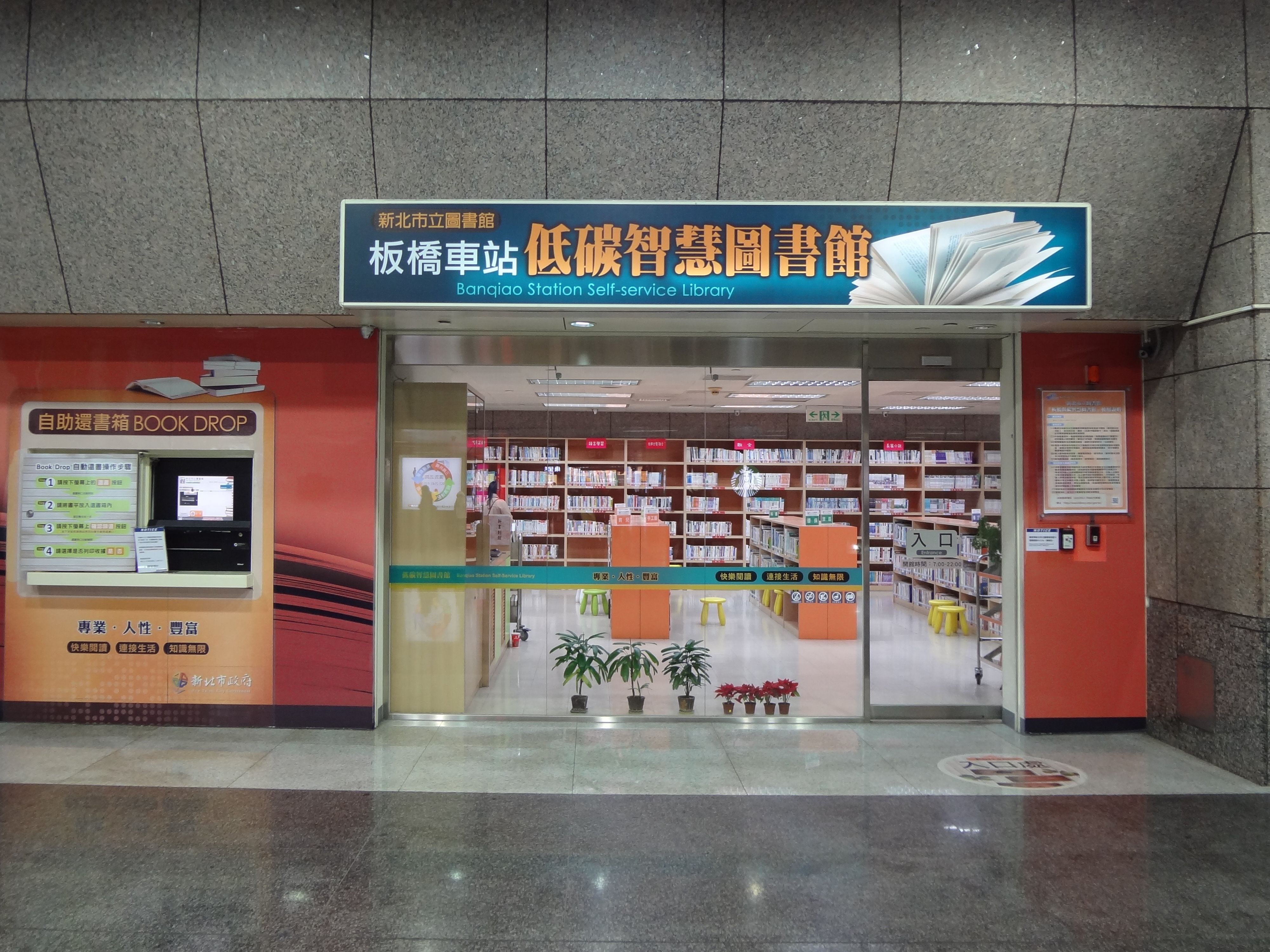 中文（台灣）: 新北市立圖書館板橋車站低碳智慧圖書館，位於板橋車站地下1樓。